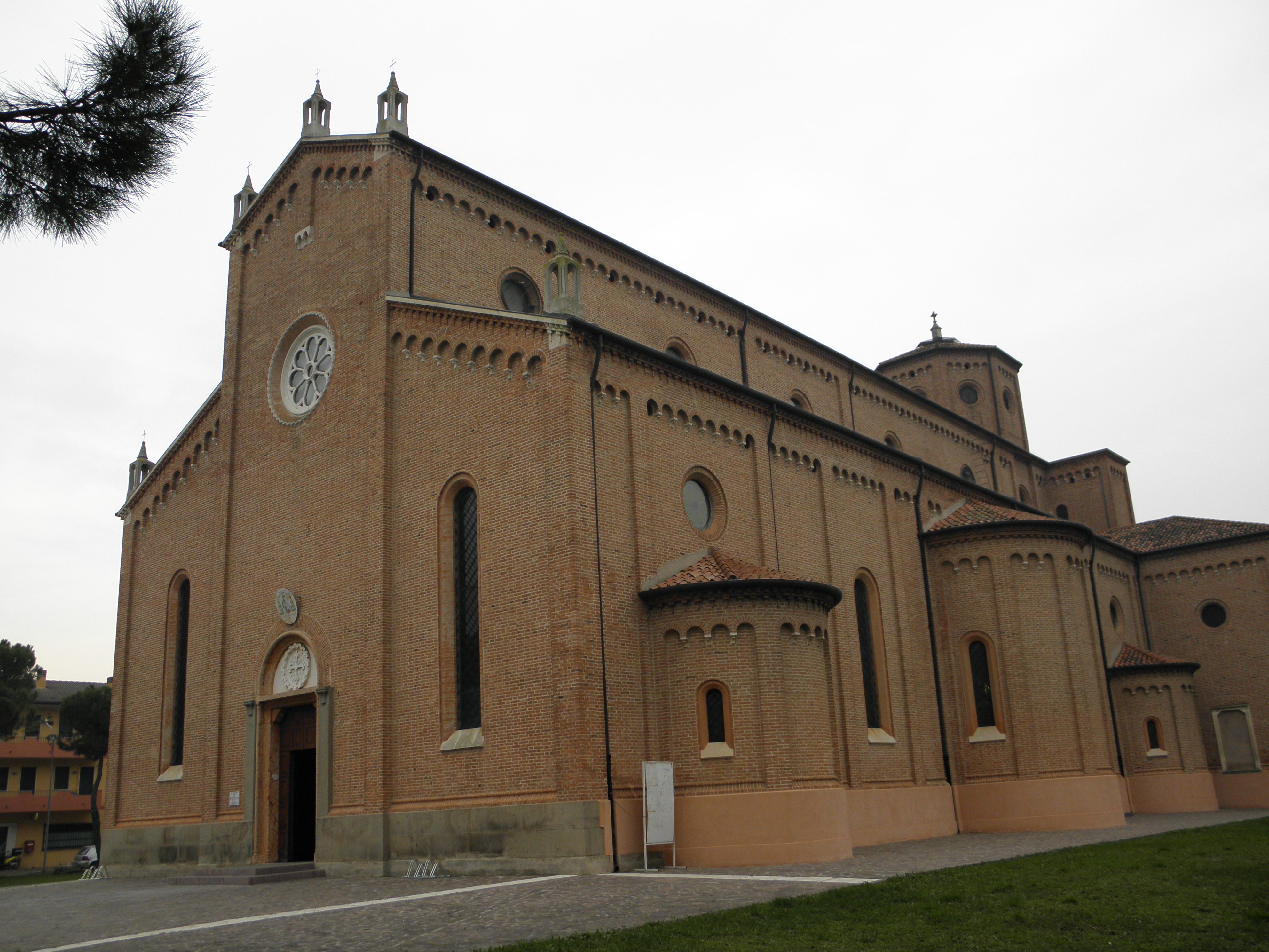 Megliadino San Fidenzio, la chiesa arcipretale di San Fidenzio.